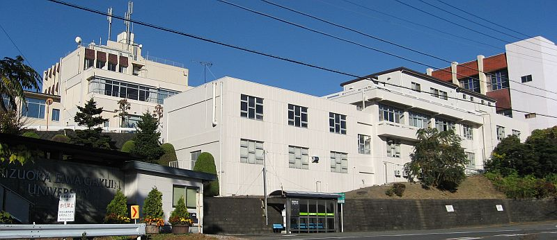 Shizuoka Eiwa Gakuin University, Shizuoka, Japan